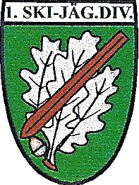 Verbandsabzeichen der 1. Skijäger-Division (Wehrmacht)